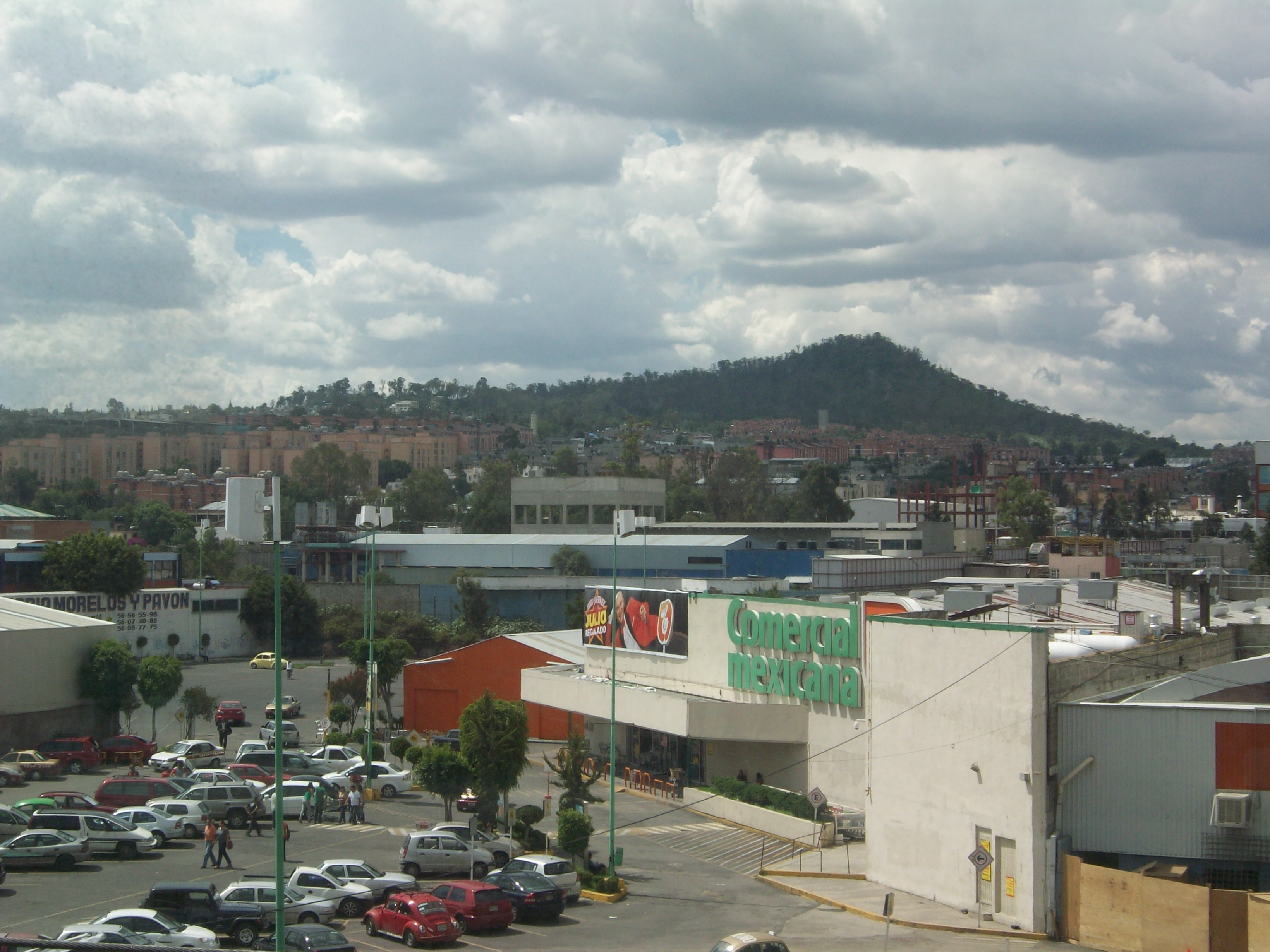 Cerro de la estrella desde Av. Tlahuac